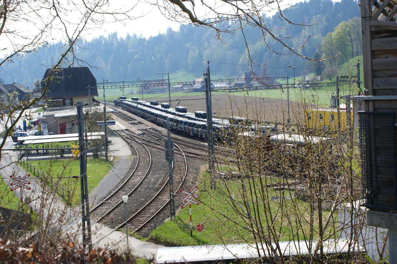 Bahnhof Sumiswald-Grünen im Emmental, nach links Ausfahrt Richtung Wasen i.E., nach rechts Richtung Huttwil, nach oben/links Richtung Ramsei